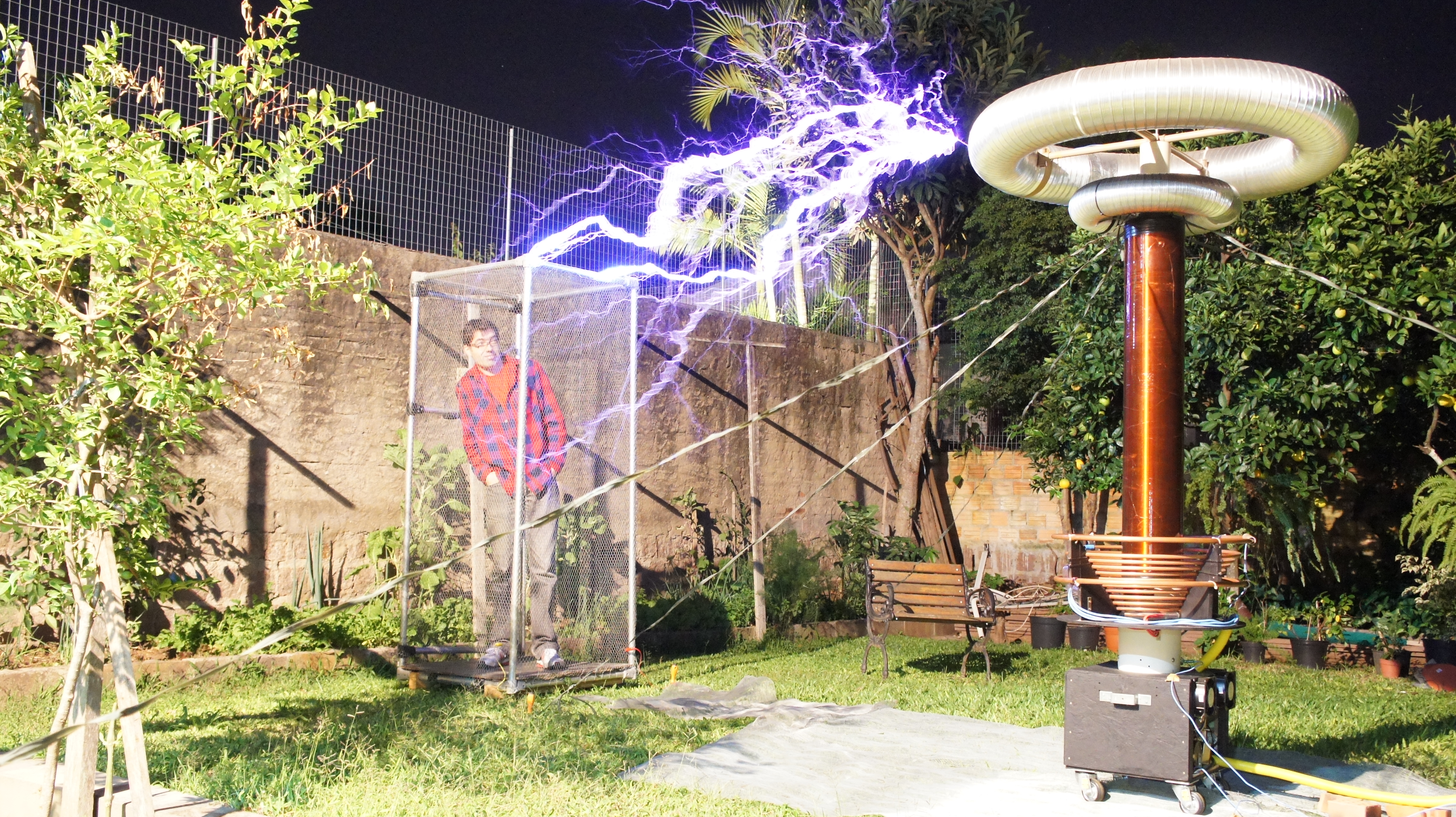 Gaiola de Faraday 23/04/2012